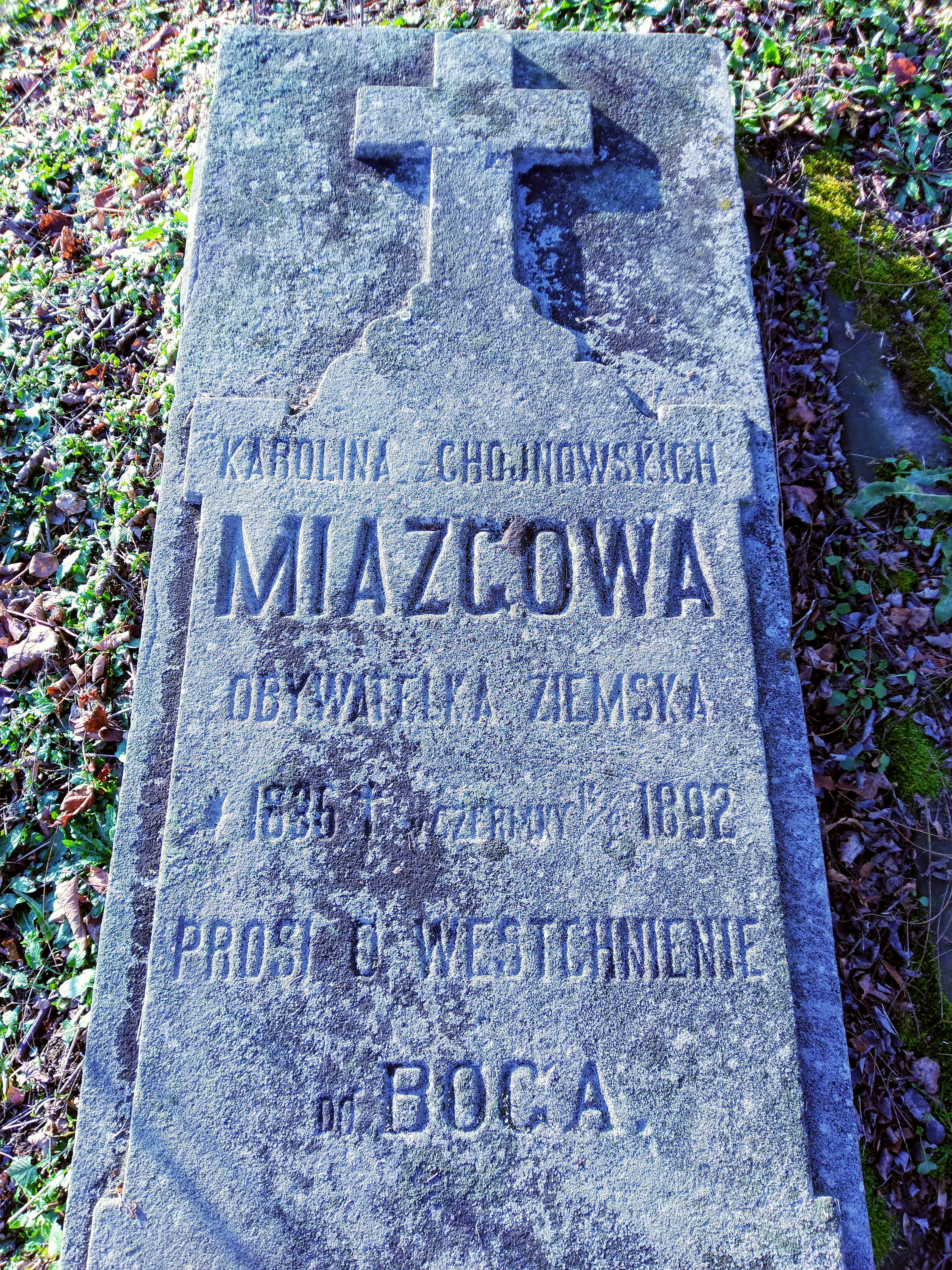 Nagrobek Karoliny Miazgowej w na Starym Cmentarzu Bączalu Dolnym autorstwa Stanisława Bodnickiego.